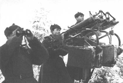 Счетверенные Максимы